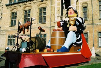 Carnaval de Bailleul - Le géant Gargantua IV sur son char. Picard: Gargantua, ch'est ch'gayant d'Bailleu.